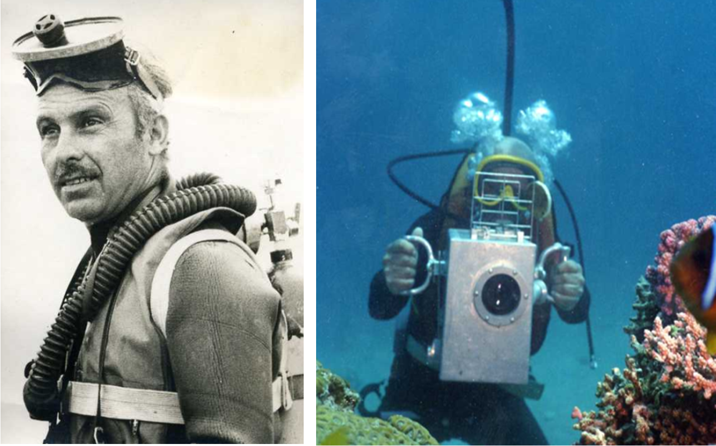 יוסף גלילי-צלם האגודה